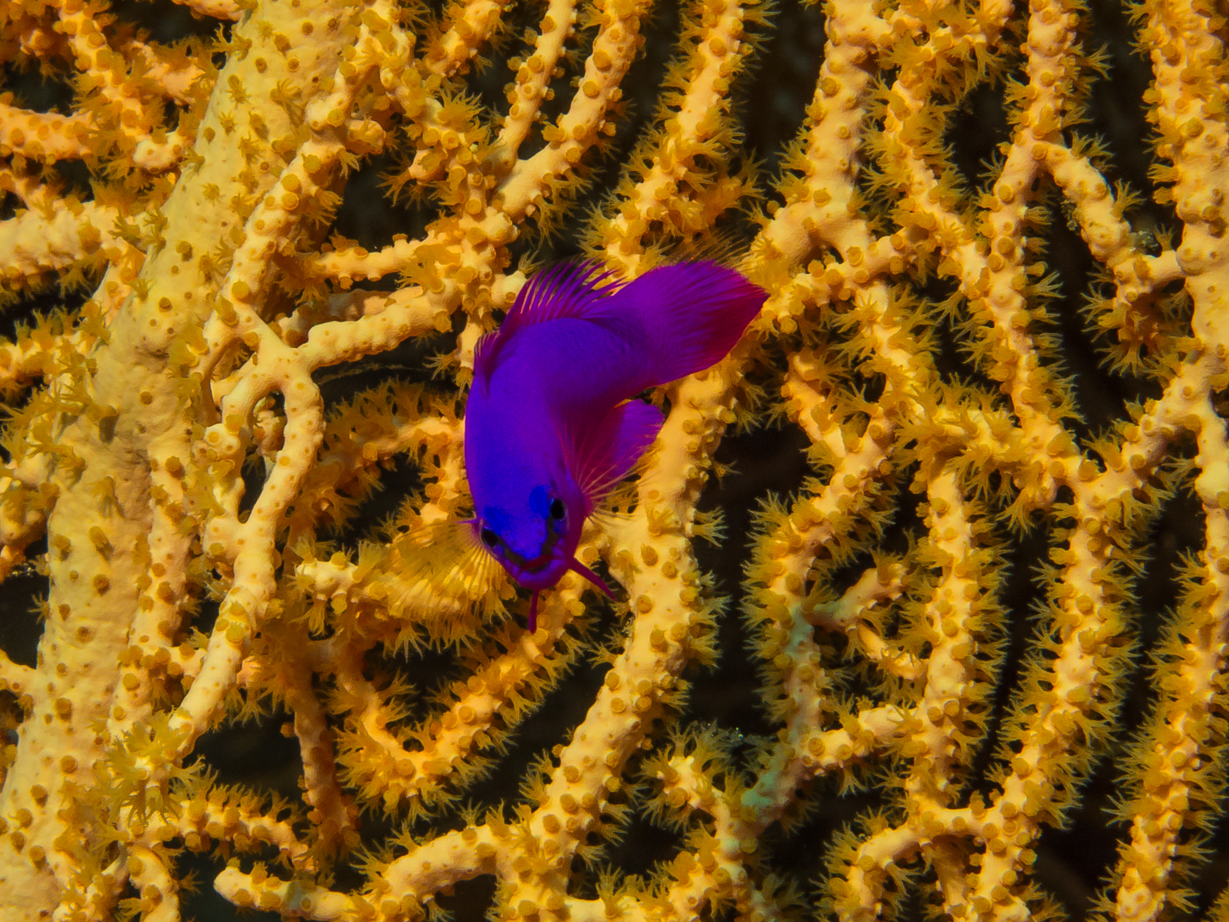 Zwergbarsch (Pseudochromis fridmani) verteidigt seine Fächergorgonie gegen aufdringliche Taucher; Shark Reef, Ras Mohammed, Sinai-Halbinsel, Ägypten